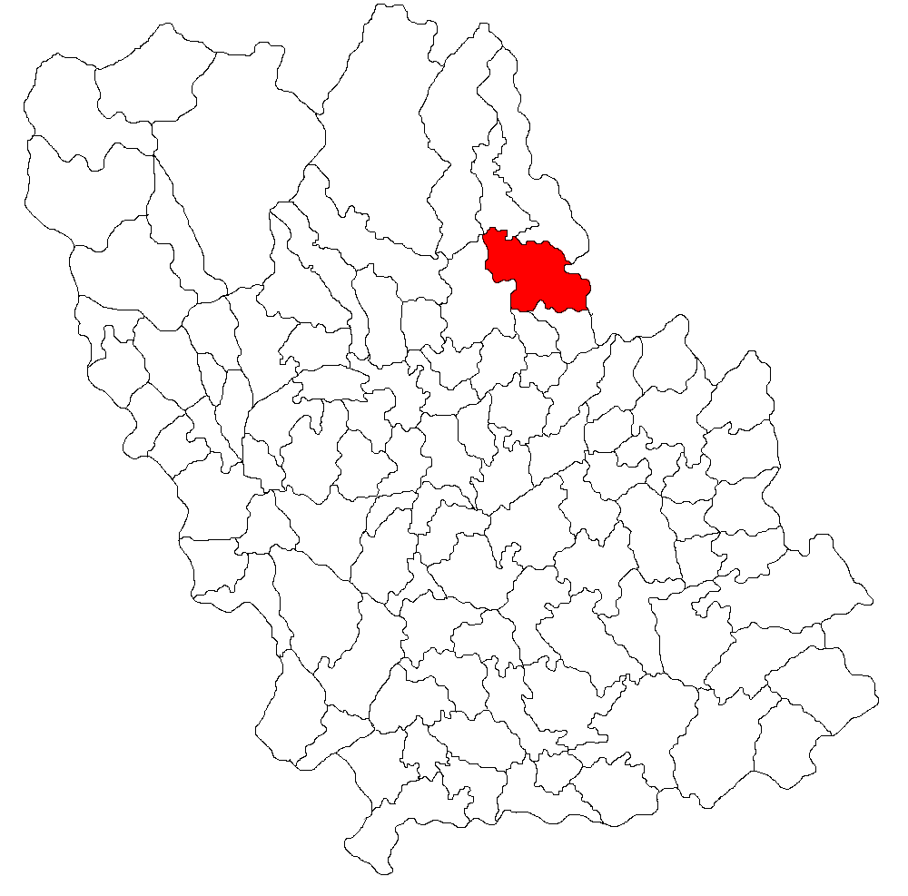 Categorie:Hărţi ale judeţului Prahova